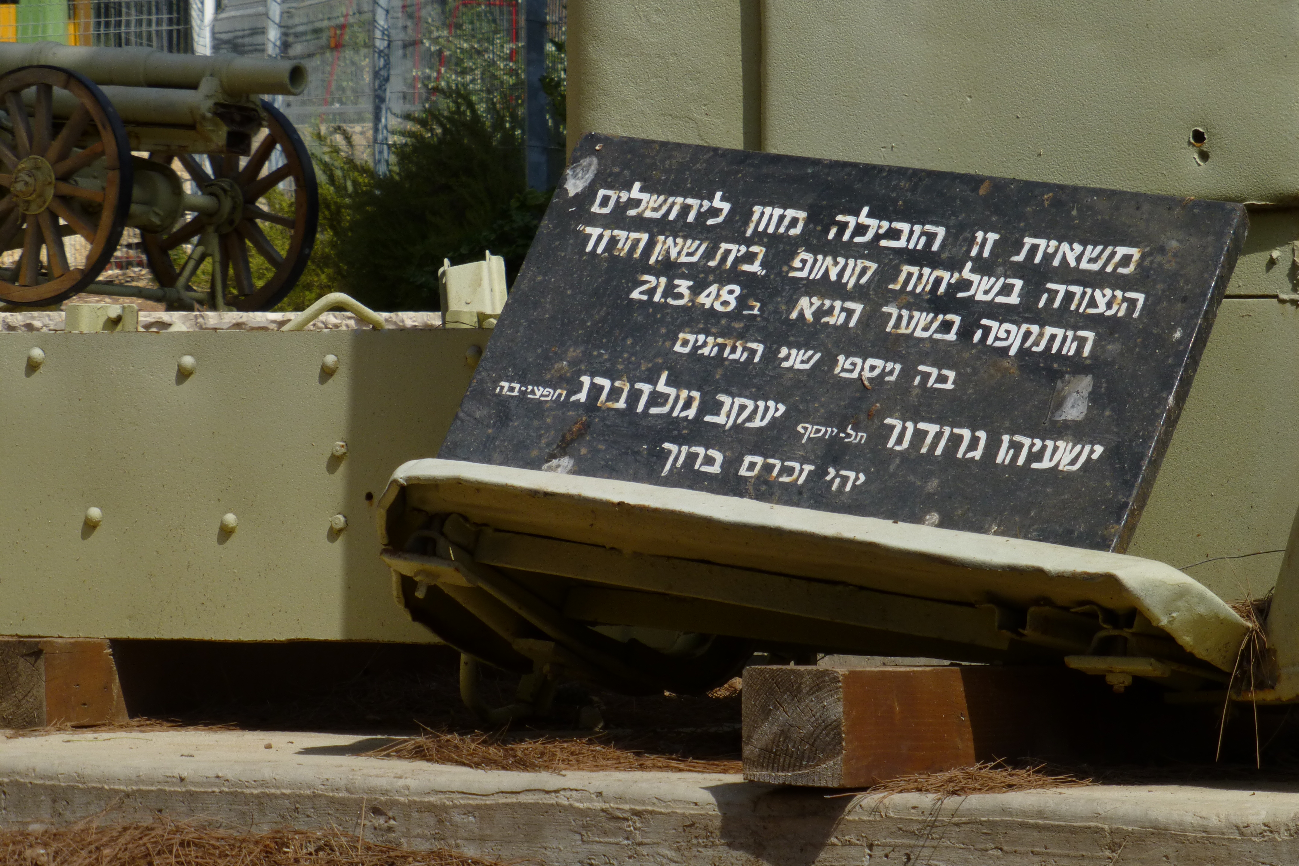 מוזיאון בית שטורמן המצוי בקיבוץ עין חרוד מאוחד נוסד בשנת 1941 על ידי חבר הקיבוץ שמואל סבוראי כמוזיאון לטבע.